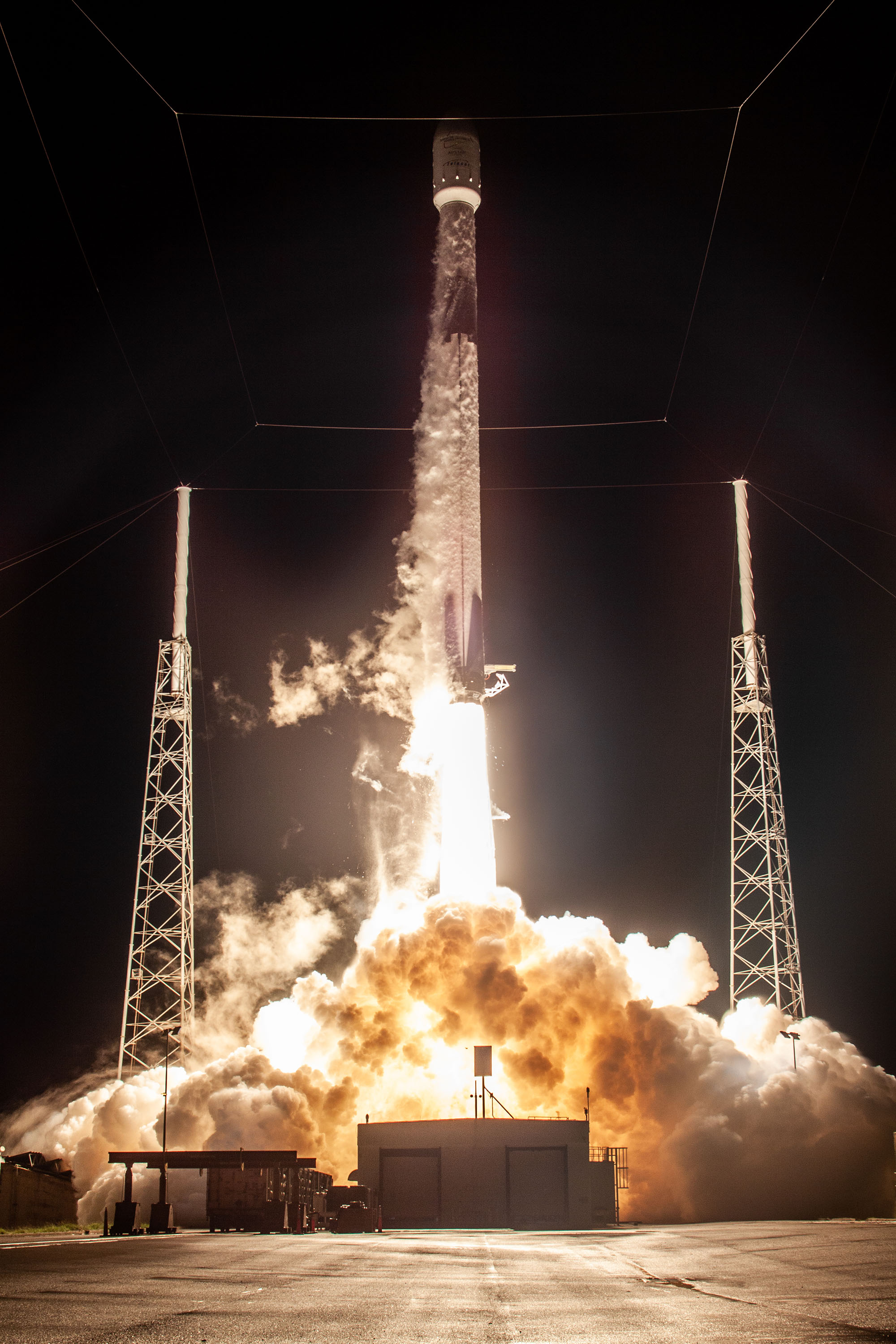 Telstar 18 Vantage Mission